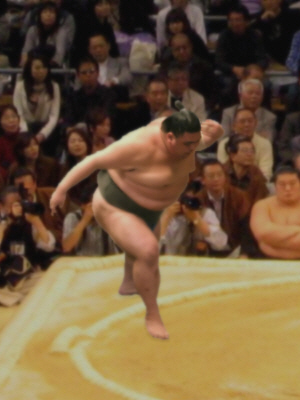 Yanagawa Dohyo-iri